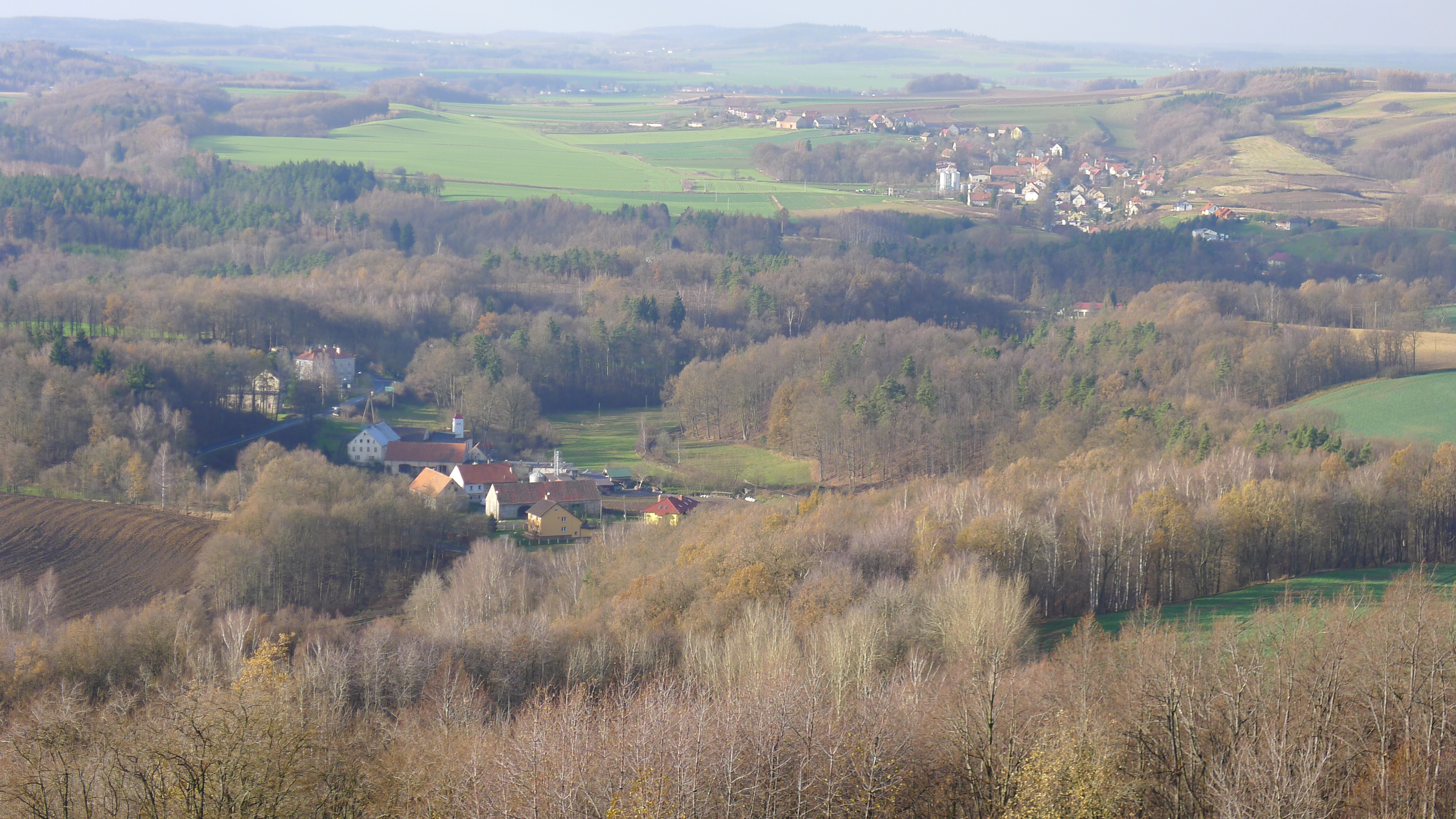 Jerzmanice-Zdrój - widok z Wilczej Góry